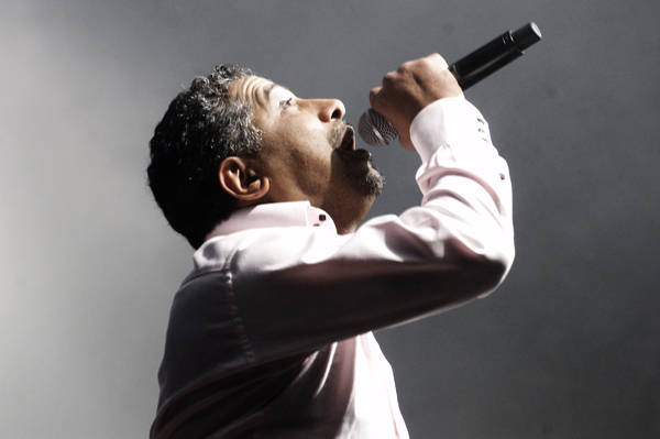 Khaled à la Fiesta des Suds à Marseille en 2009